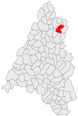 Categorie:Hărţi ale judeţului Bihor